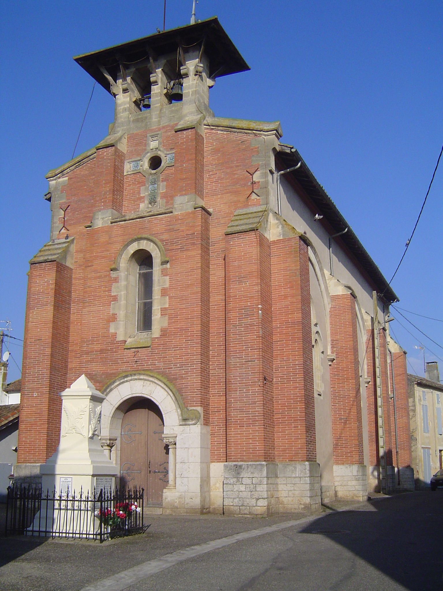 Vue de l'église Saint-Cloud à Monheurt